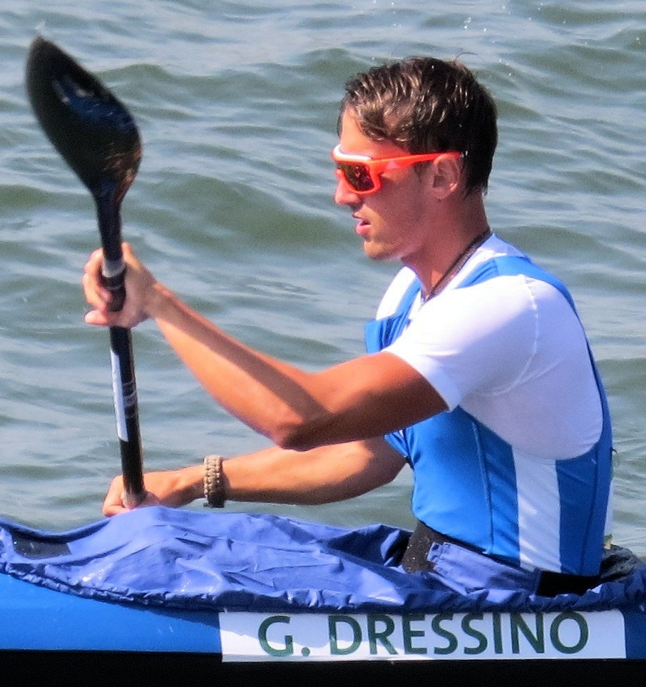 Sx50